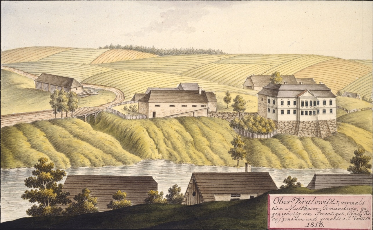 Honrí Kralovice Ober Kralowitz vormals eine Maltheser Commanderie gegenwärtig ein Privatgut Czasl. Kr. aufgenommen und gemahlt v. J. Venuto 1813